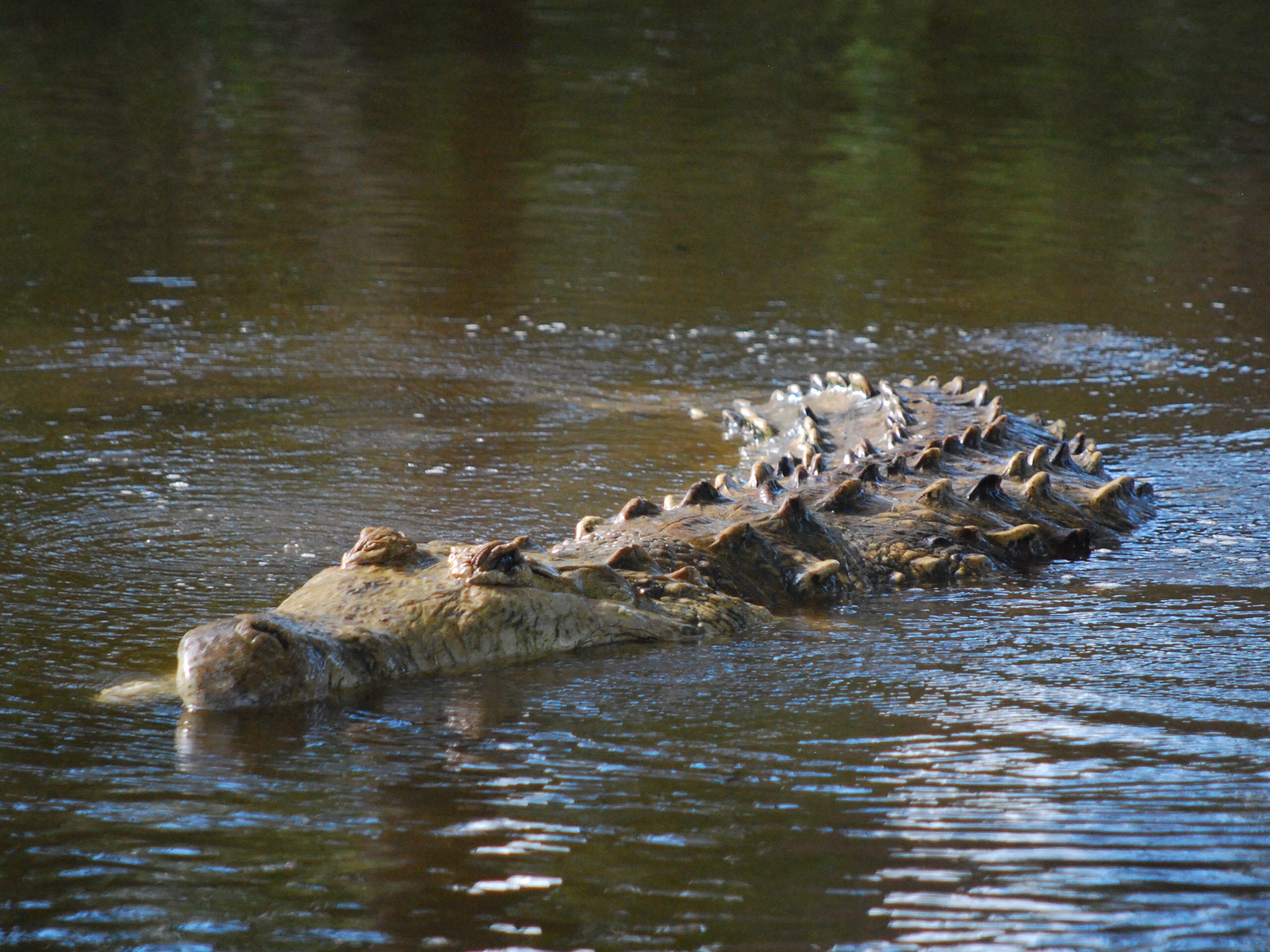 Esta foto fue tomada en la Estacion Biologica del Hato El Frio en el Estado Apure. Tuve la suerte de fotografiar a un Caimán del Orinoco de al menos unos 6mts de largo y al que se le conoce por "Joselo"